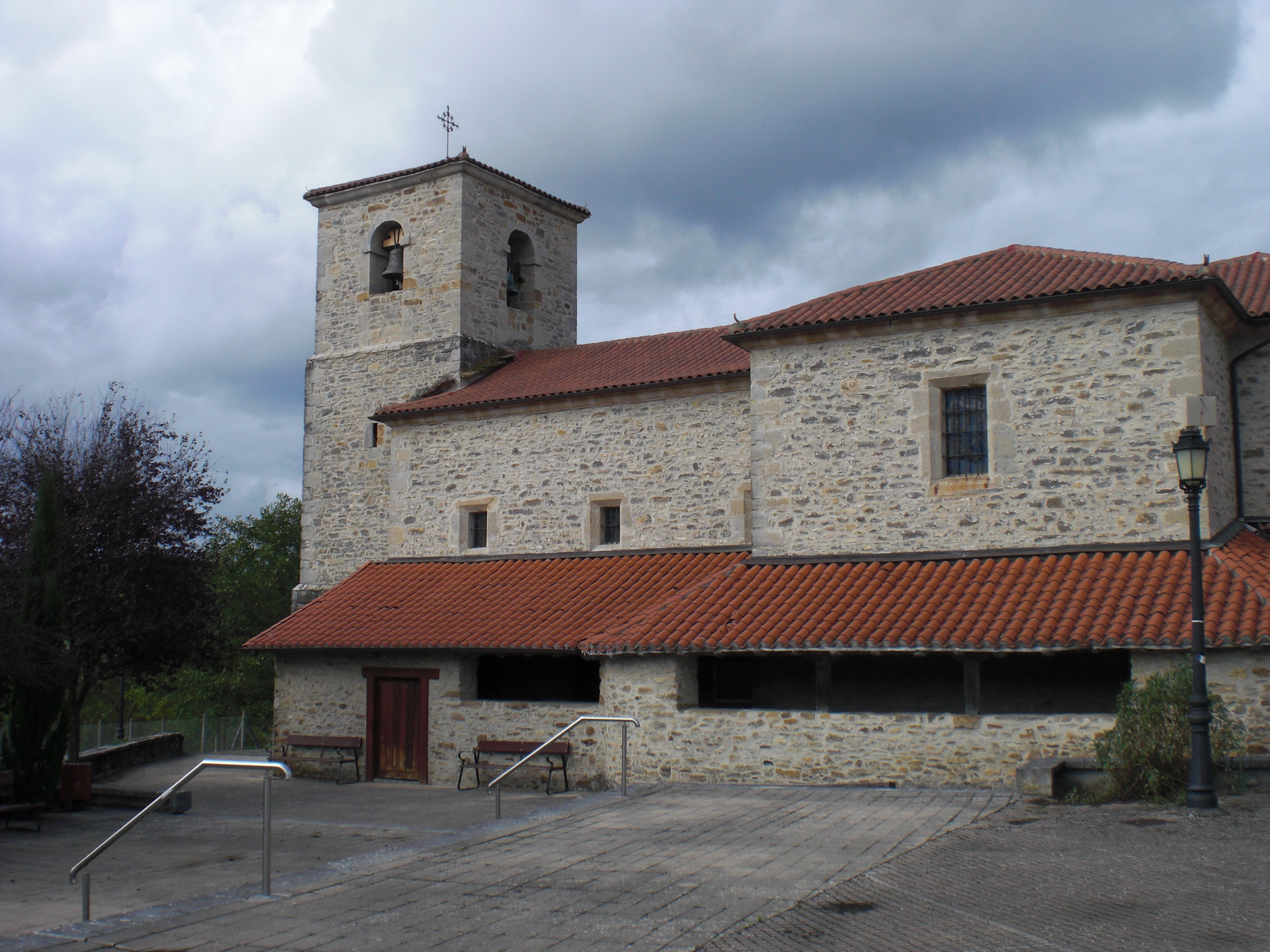 Aiarako Murgako eliza